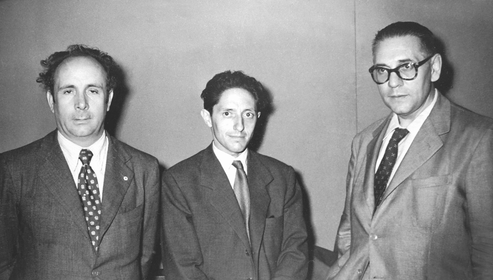 Laxeiro, Isaac Díaz Pardo e Luís Seoane en Buenos Aires en 1955